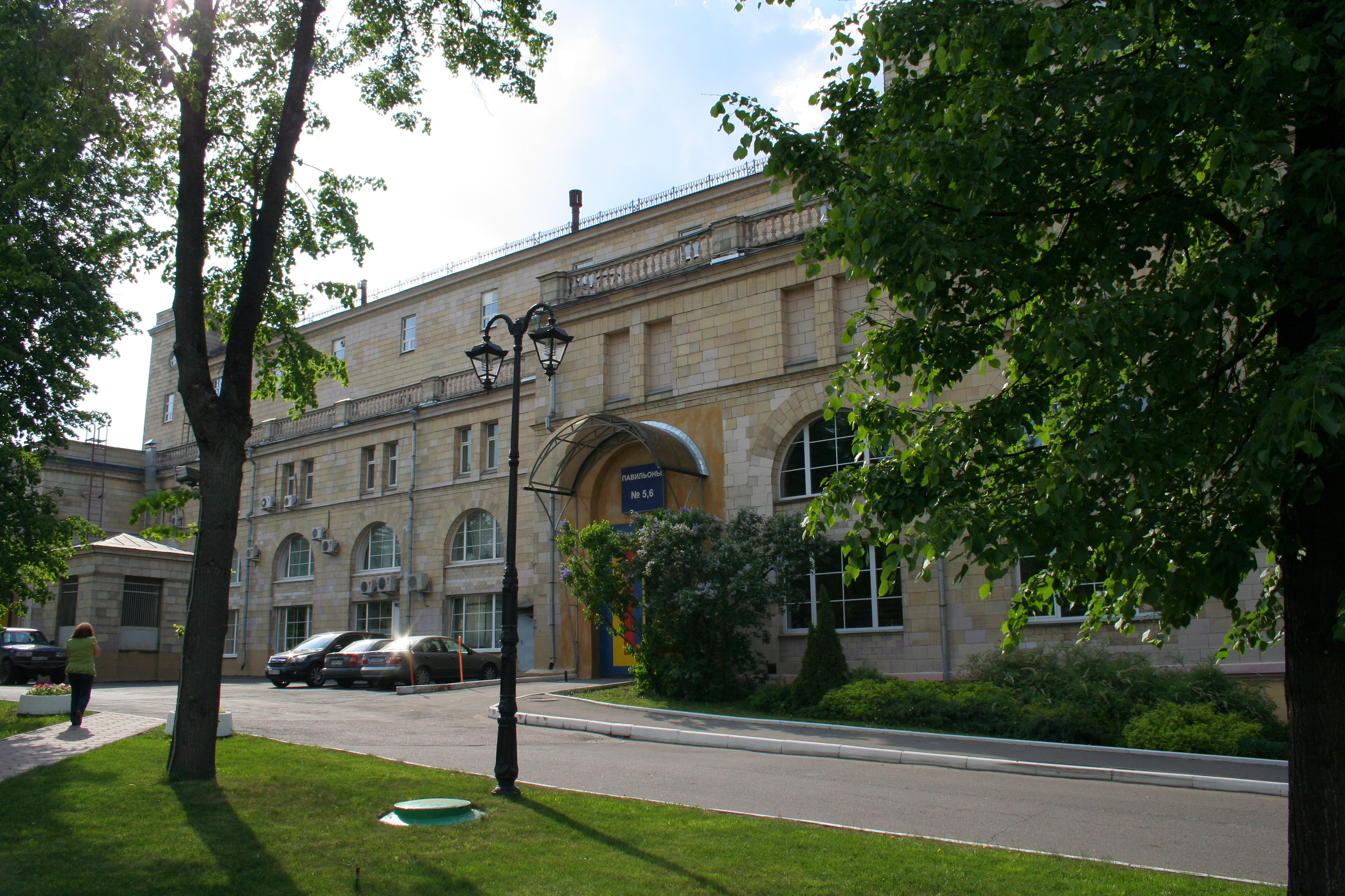 Filmstudiogelände von Mosfilm in Moskau. Ein Pavillon von außen.